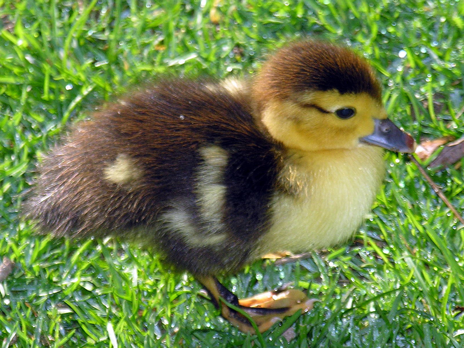 self made.